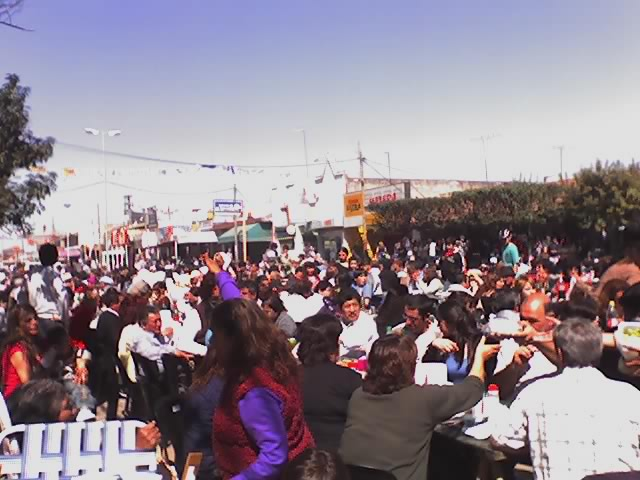 Comunidad parroquial celebrando fiesta en honor a la Vírgen de Itatí, Parque San Martín, Merlo, Argentina.